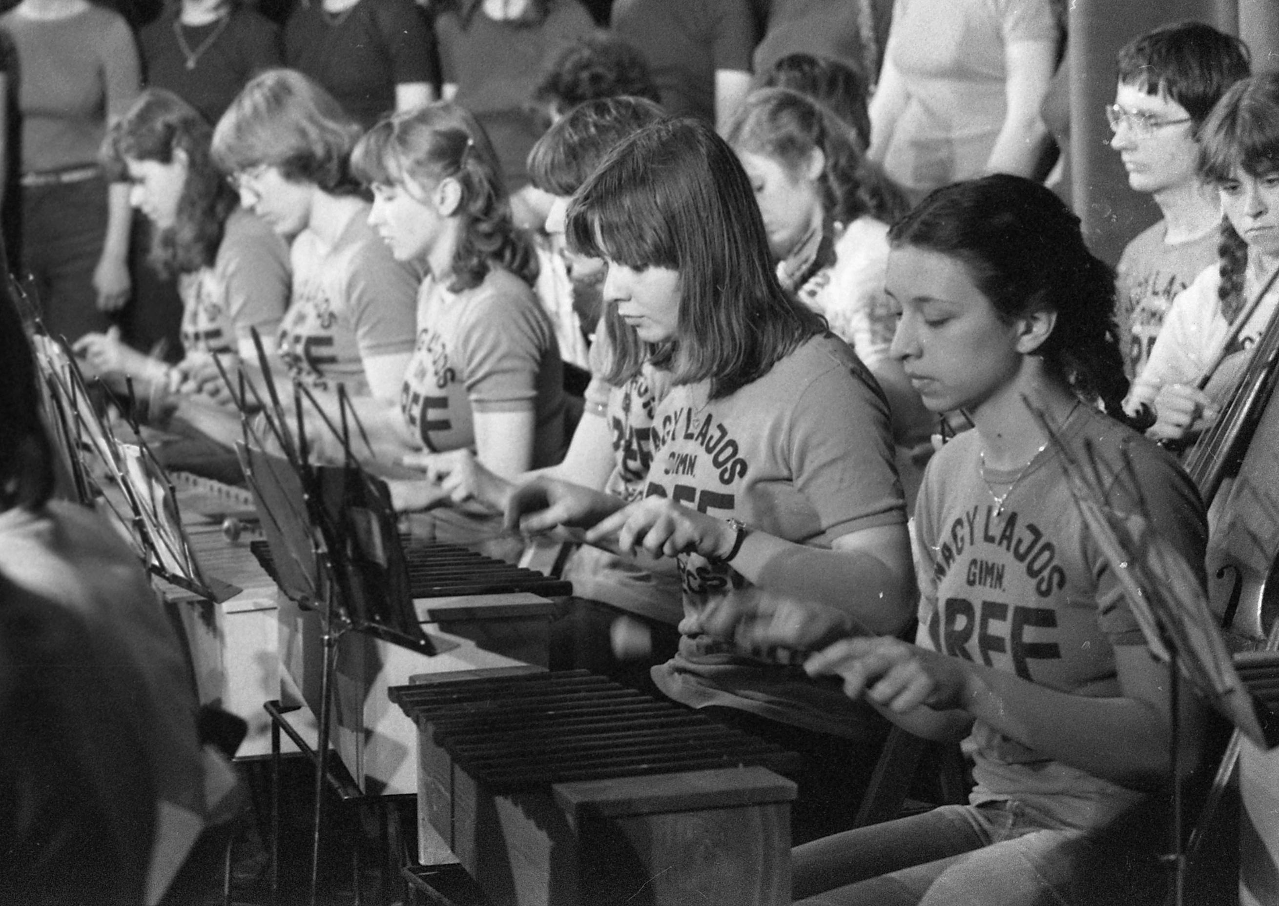 Magyarország első Orff-együttese 1965 szeptemberében alakult Ivasivka Mátyás karnagy vezetésével. Helyszín: Keszthely, Helikon'81 fesztivál